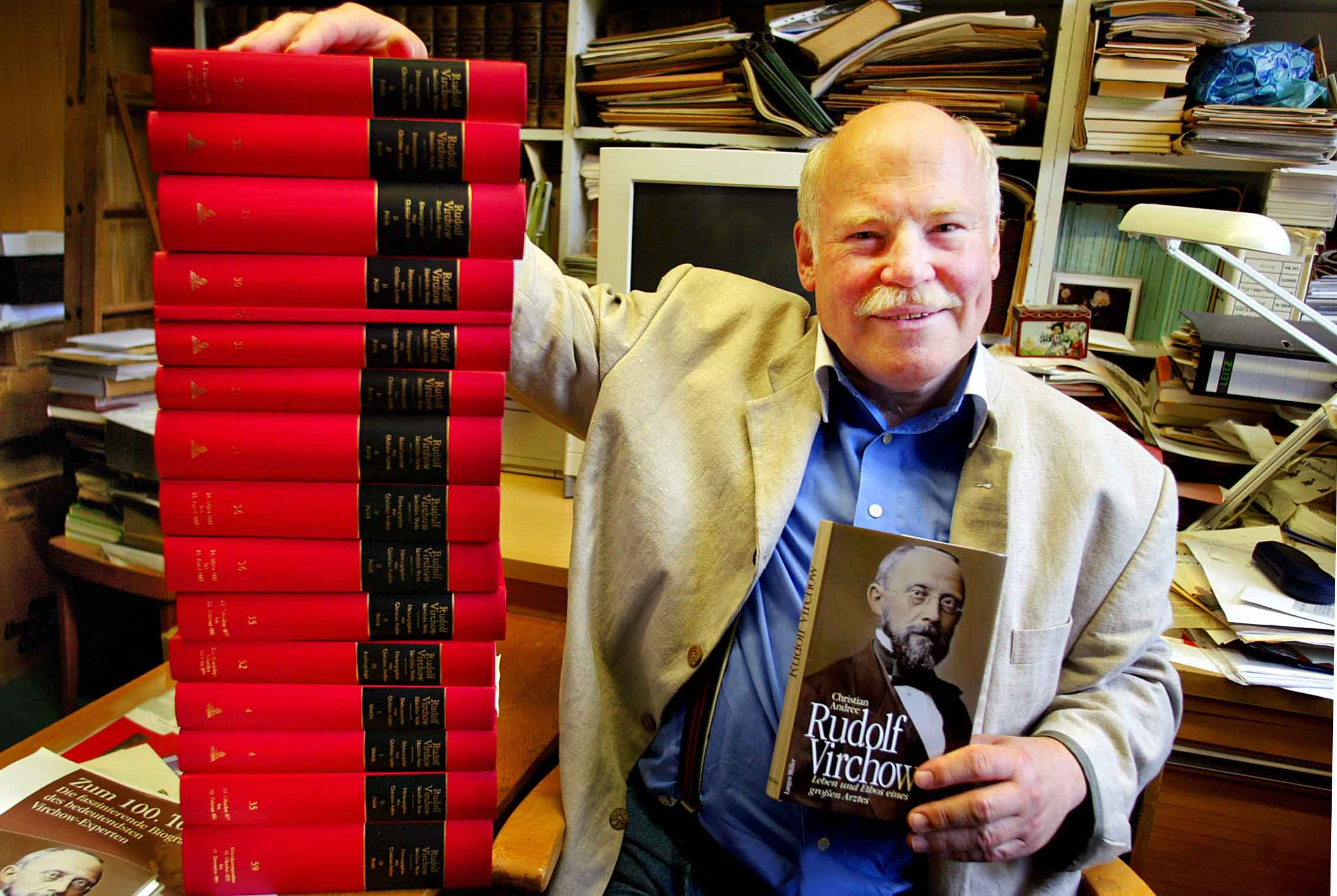 Prof. Dr. Christian Andree mit den ersten 19 von 44 Bänden der Gesamtausgabe Rudolf Virchow.